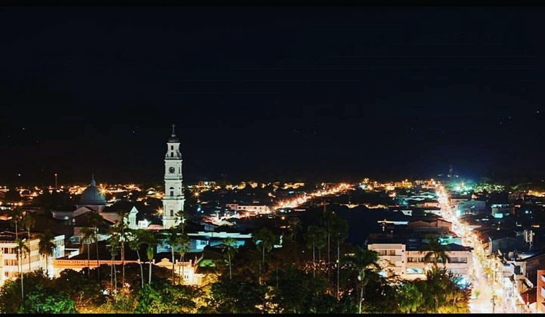 Cartago Colombia